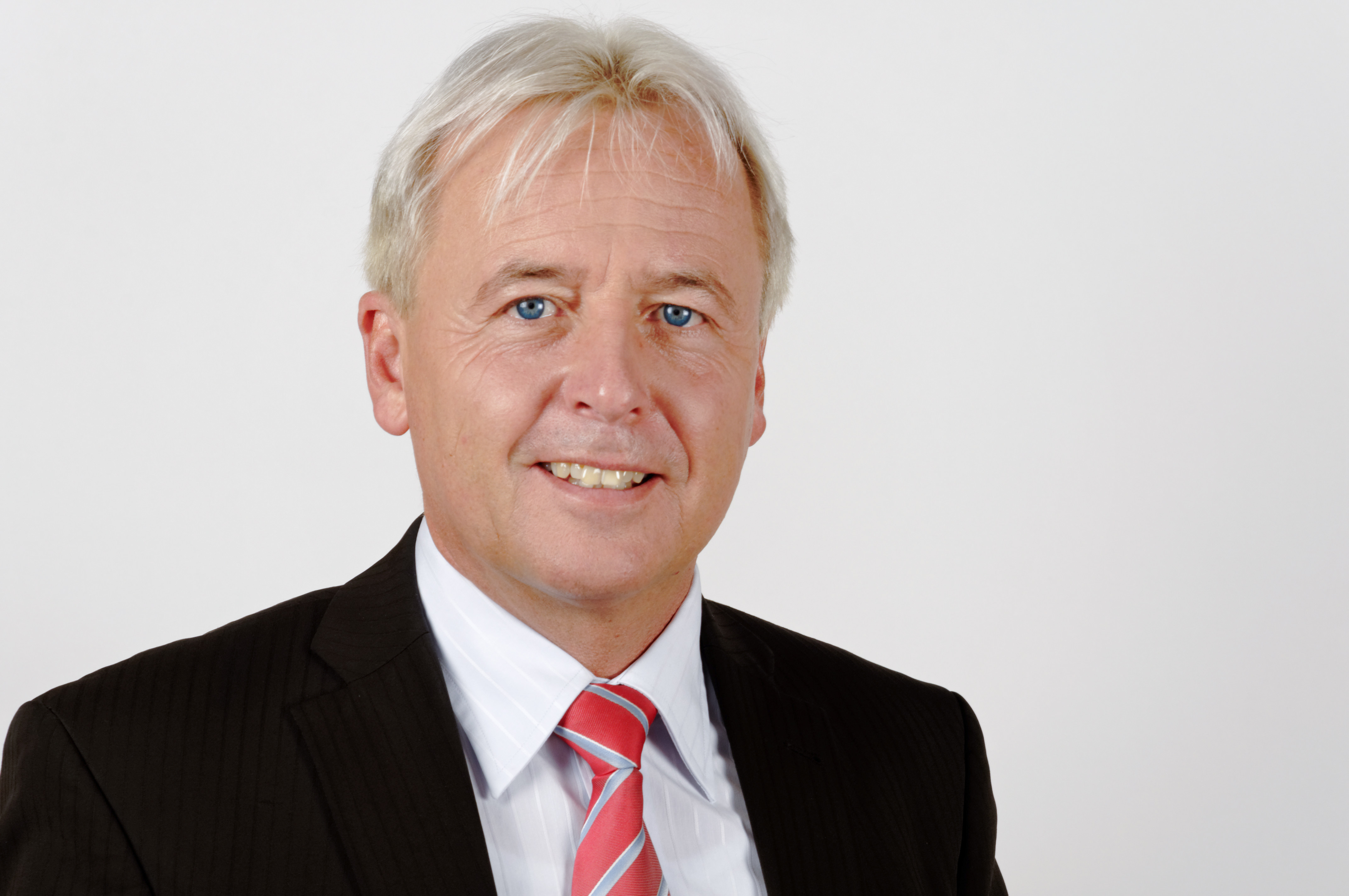 Landtagsprojekt Bayern